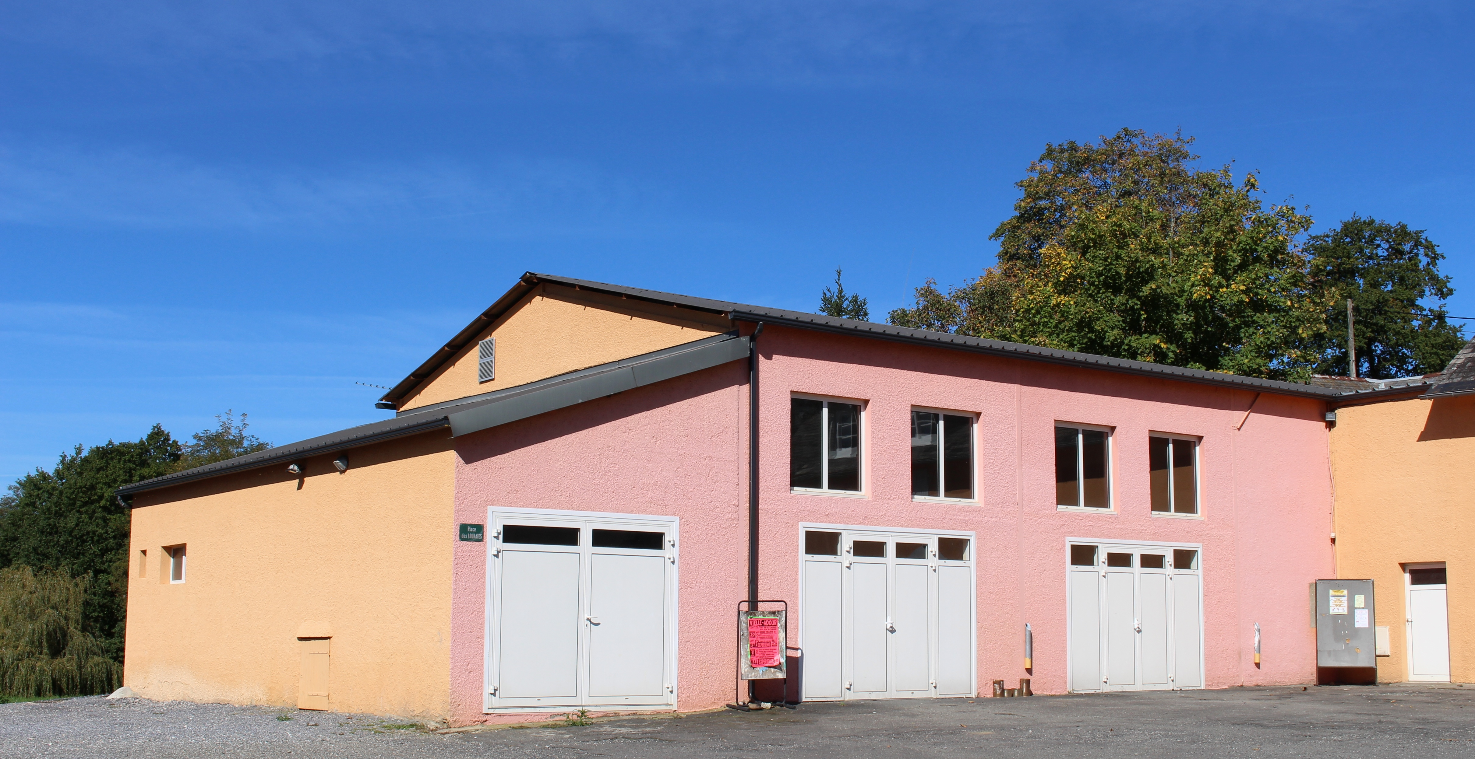 Salle des fêtes de Barbazan-Dessus (Hautes-Pyrénées)